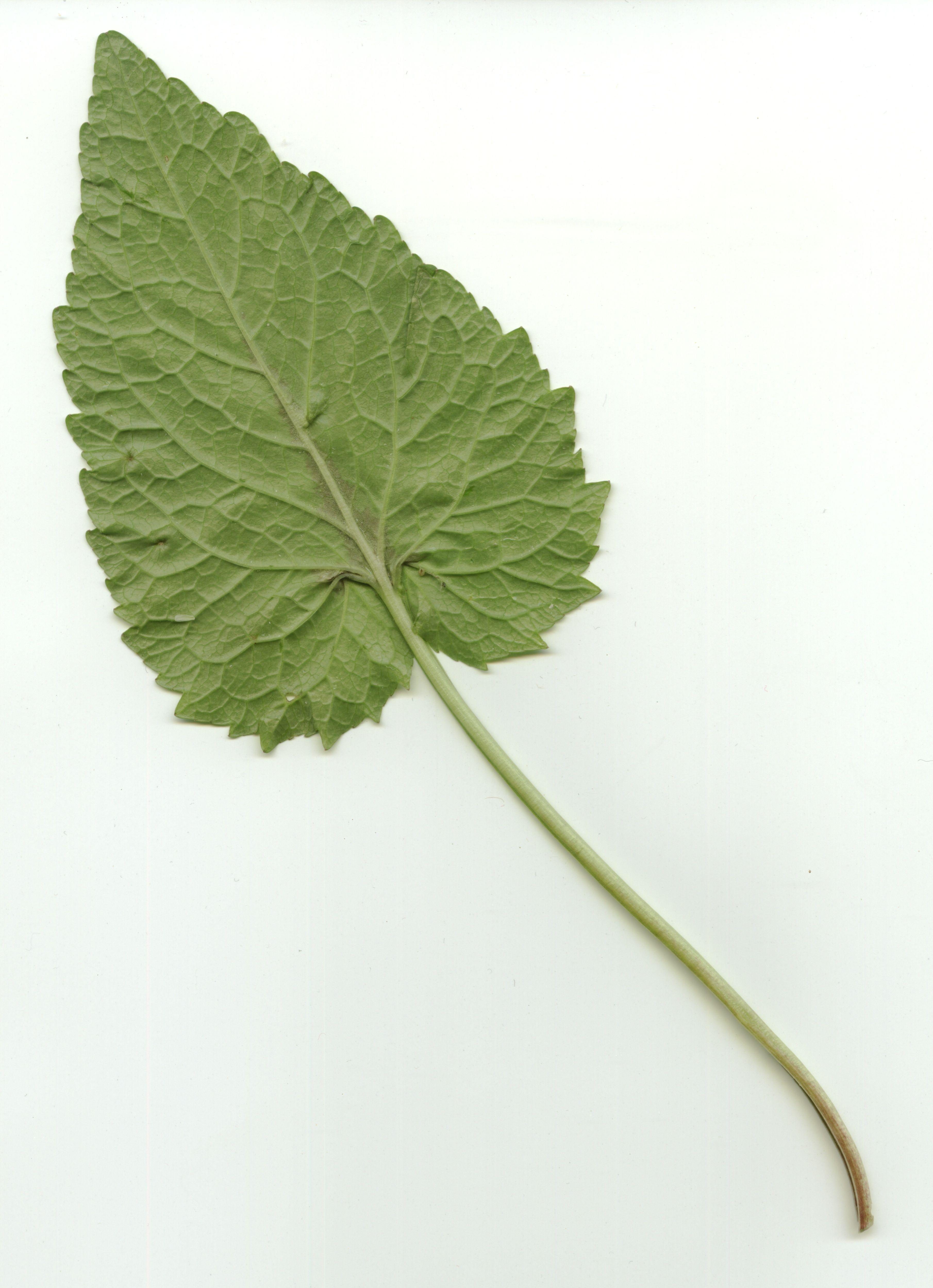 Unteres Blatt der Ähringen Teufelskralle von unten